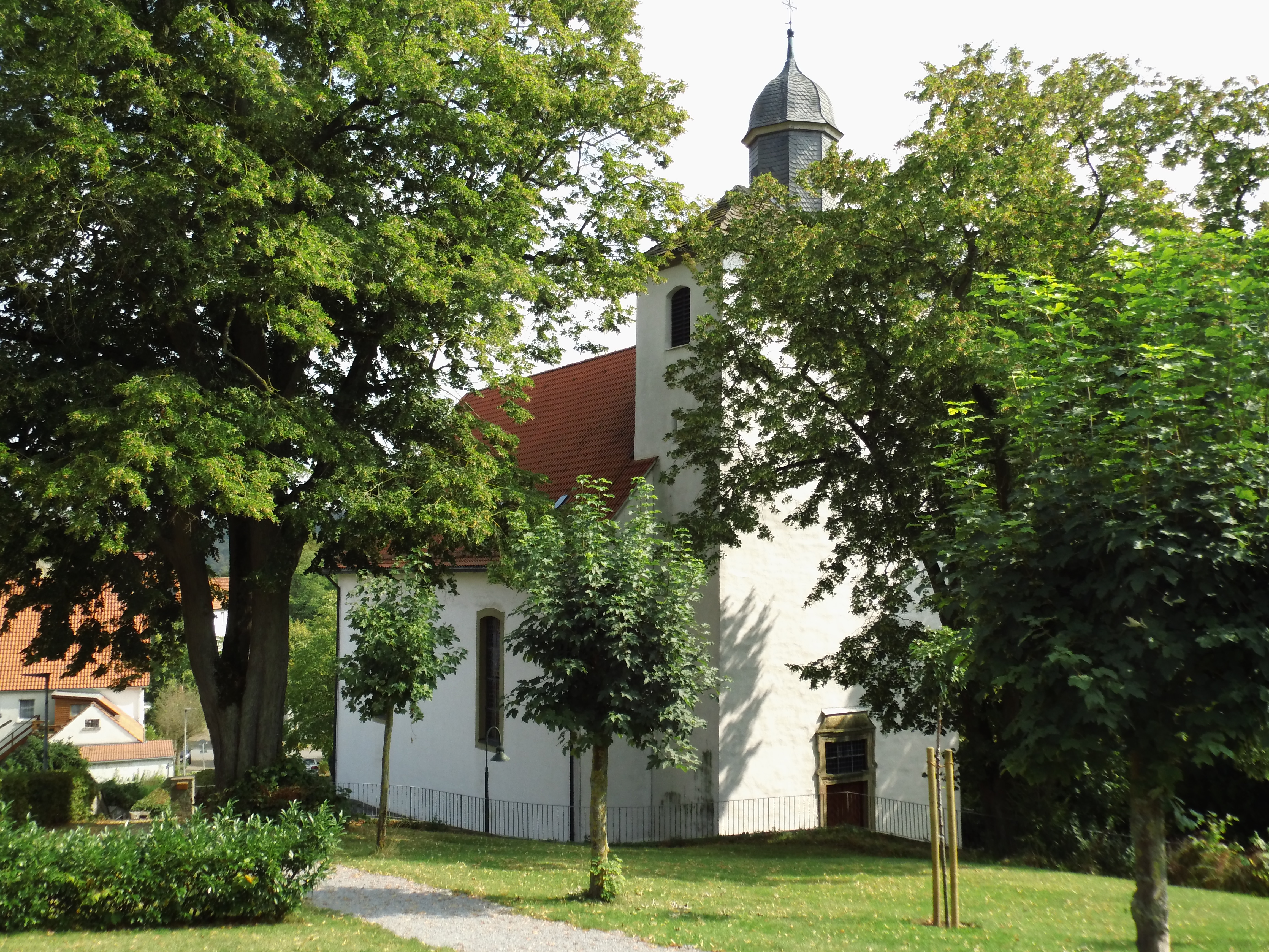 Baudenkmal, Liste der Baudenkmäler in Willebadessen Nr. 20